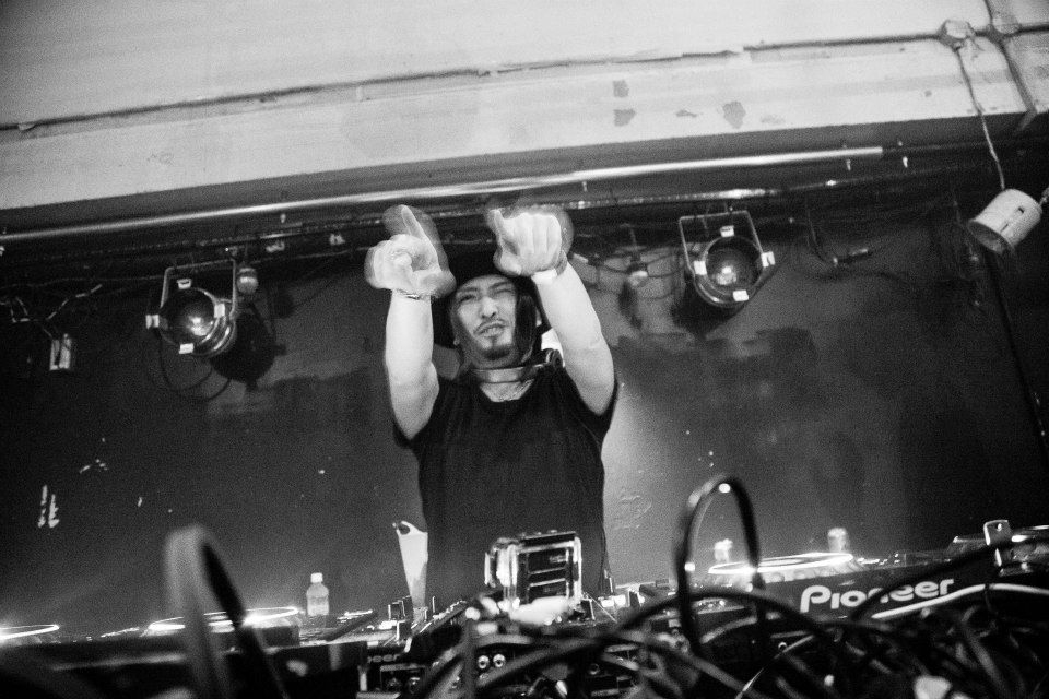 at womb club